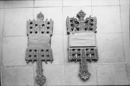 Gure etxeko argizaiola. Segura, Gipuzkoa. Euskal Herria. Argizaiola from our home. Segura, Guipuscoa, Basque Country.